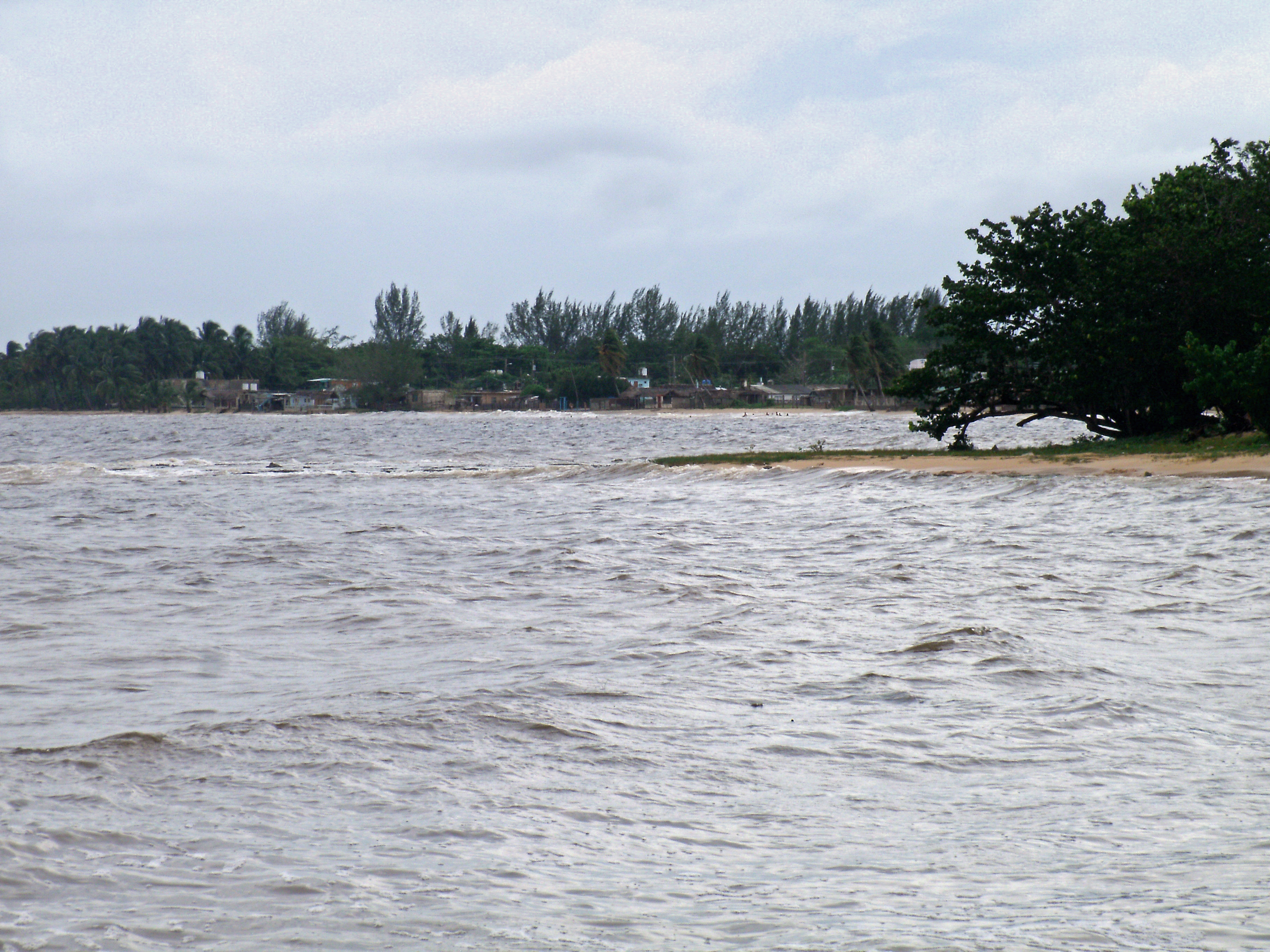 Playa Larga se situe au fond de la Baie des Cochons - Province de Matanzas, Cuba.